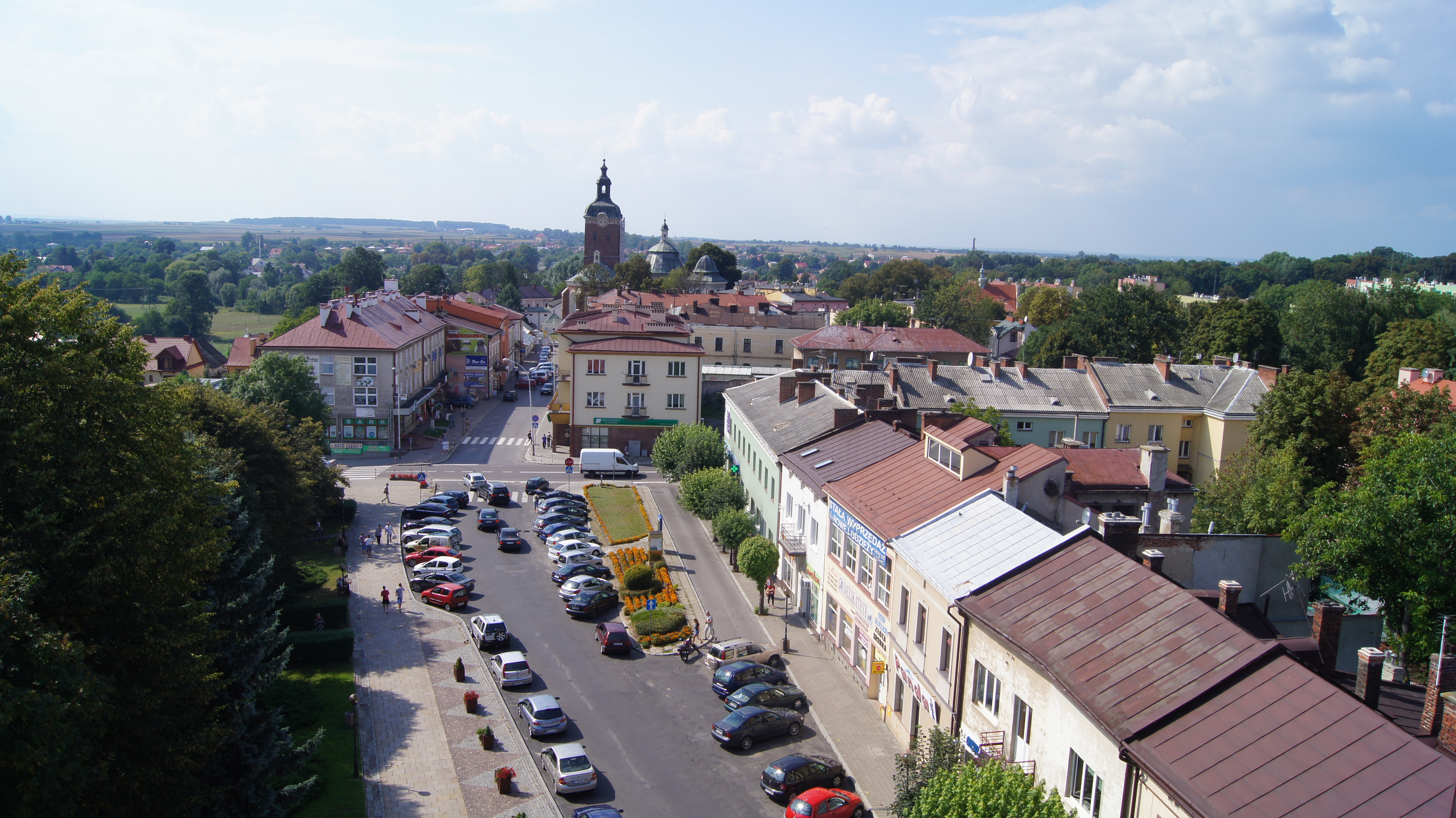 Widok z ratusza w Przeworsku